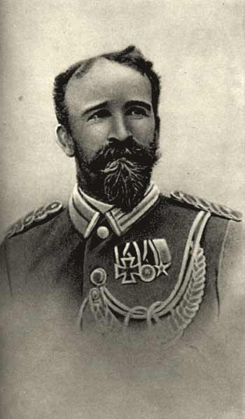 Curt Von Francois (1852-1931) en uniforme colonial